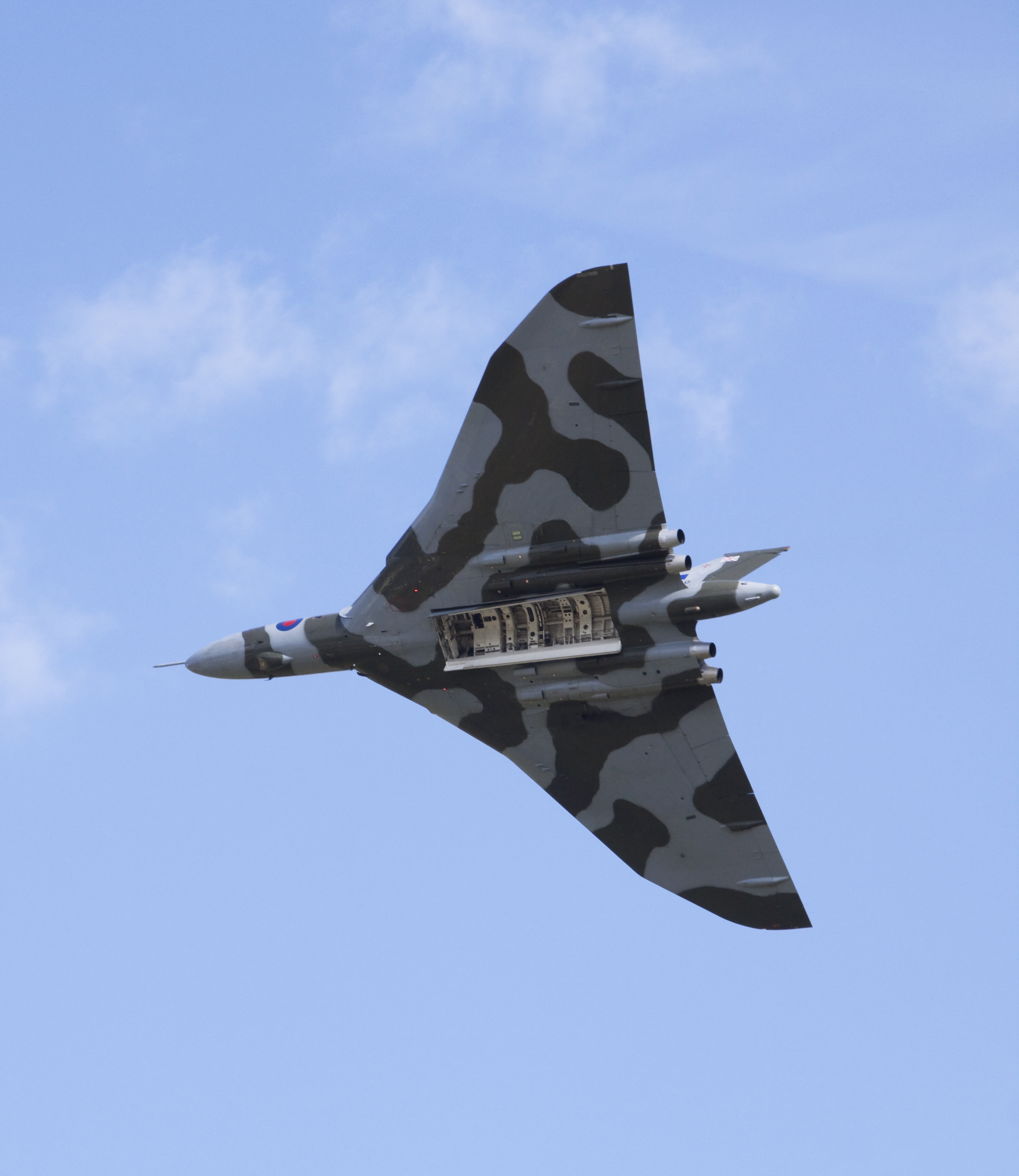 Avro Vulcan Bomb bay doors open